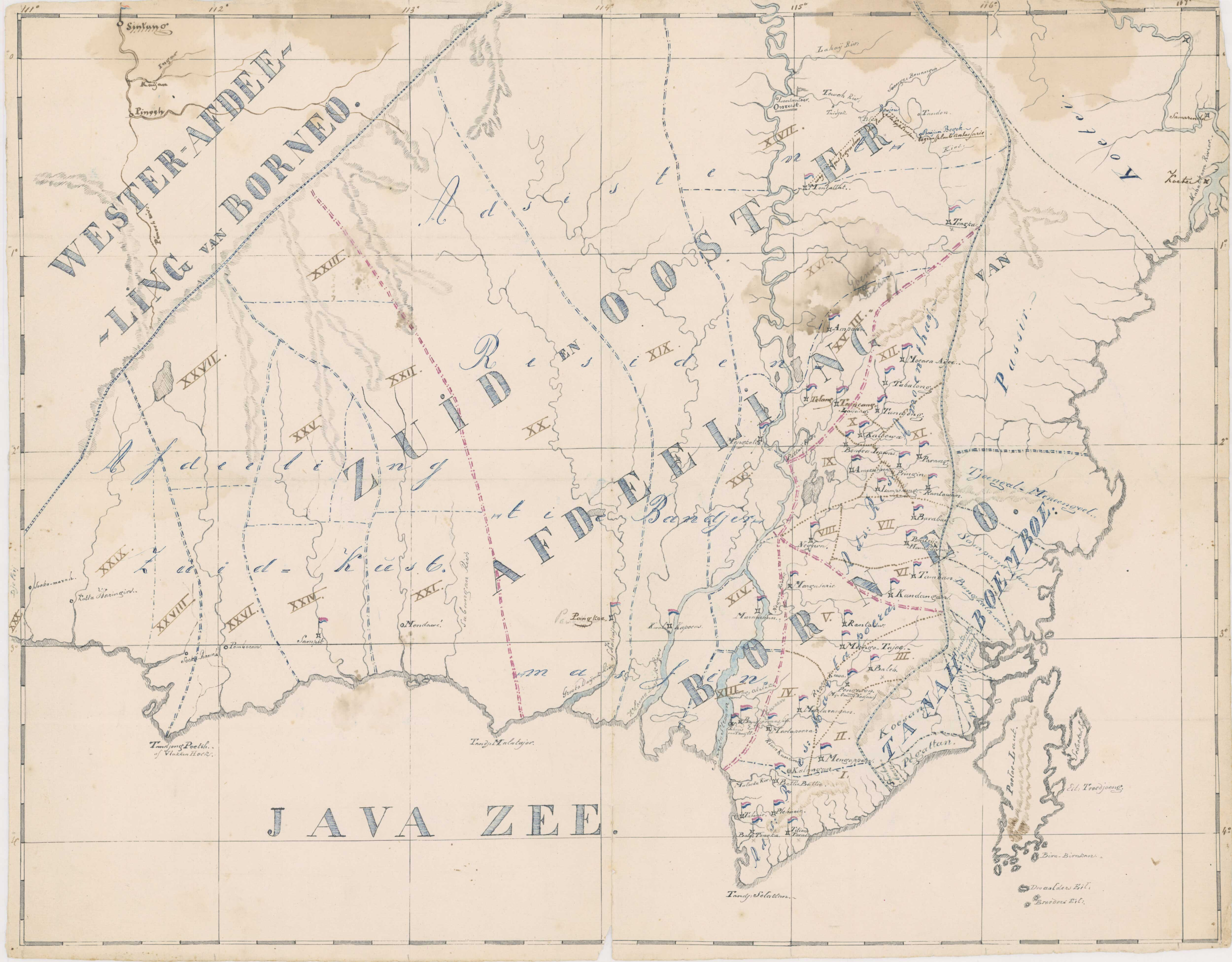 Peta manuskrip wilayah Banjarmasin, Kalimantan Selatan, Kalimantan, kondisi saat Perang Banjar (1859-63)